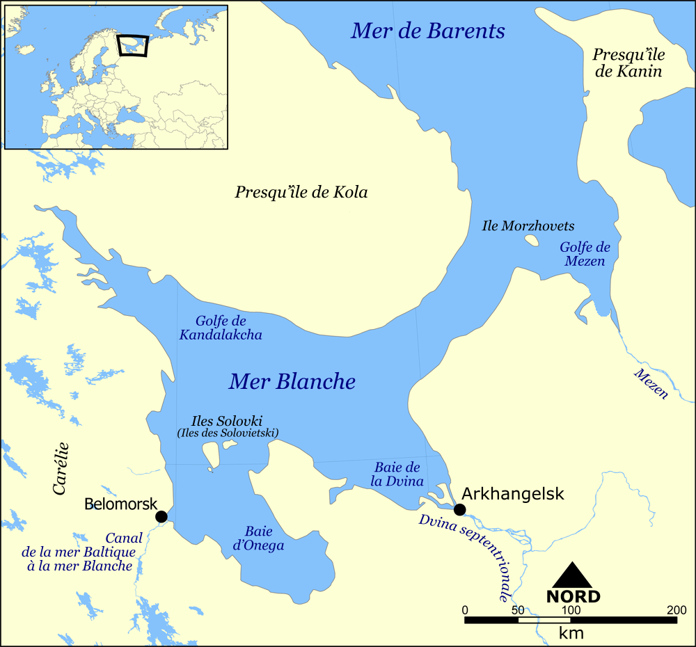 Titre : carte de la mer Blanche Date : juin 2006 Auteurs : NormanEinstein, Idarvol Carte origninale : Image:White_Sea_map.png